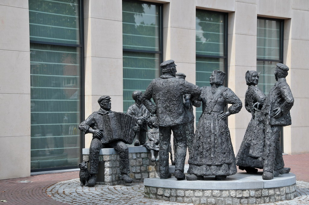 Beeldengroep van 8 dansers, naar voorbeeld van de Larense folkloristische dansgroep "De Klepperman van Elleven". Made by Dutch artist Marianne Houtkamp (Amsterdam 1948). Geplaatst vóór de Rabobank in de Burgemeester van Nispenstraat in Laren/The Netherlands. Aangeboden door 3 jubilarissen: Rabobank Laren-Blaricum (100 jaar) Drukkerij Wijland (75 jaar) en Marianne Houtkamp (50 jaar)